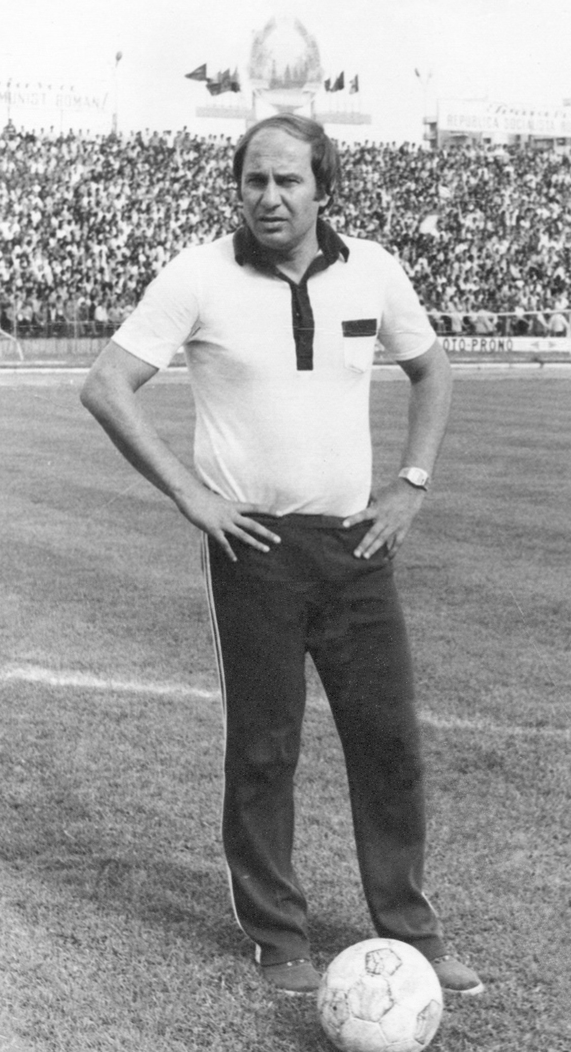 Ion Oblemenco